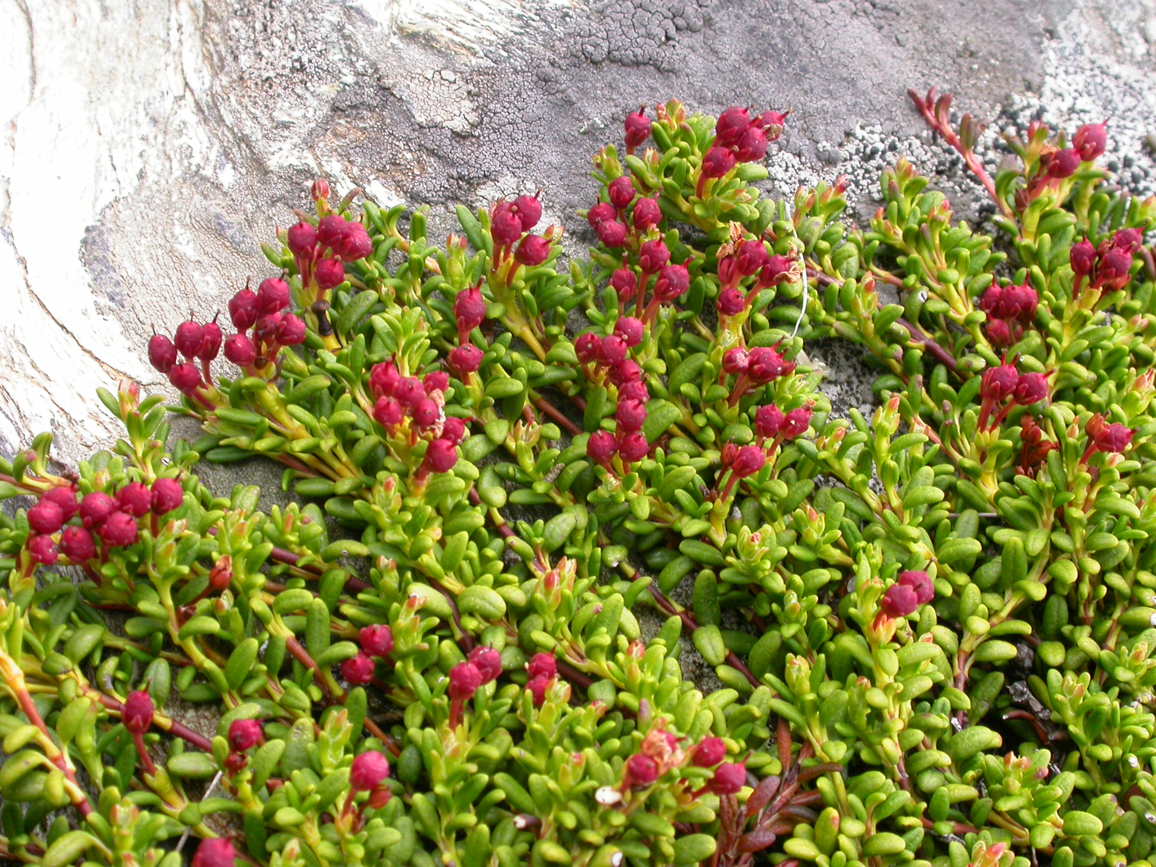 Loiseleuria procumbens Zermatt, Riffelberg (Kanton Wallis, Switzerland), 2500 m Author: Barbara Studer – own photograph Date: 2.08.06